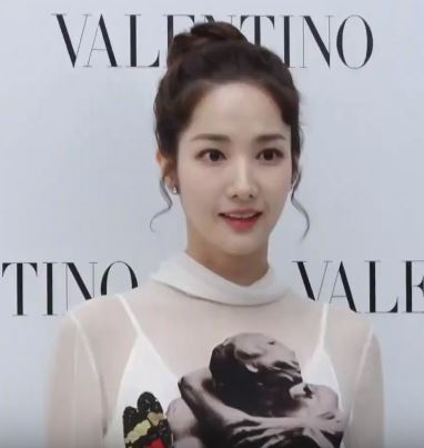 배우 한예슬, 김사랑과 박민영이 5일 오후 서울시 성동구 성수동의 한 매장에서 열린 브랜드 행사에 참석했다.